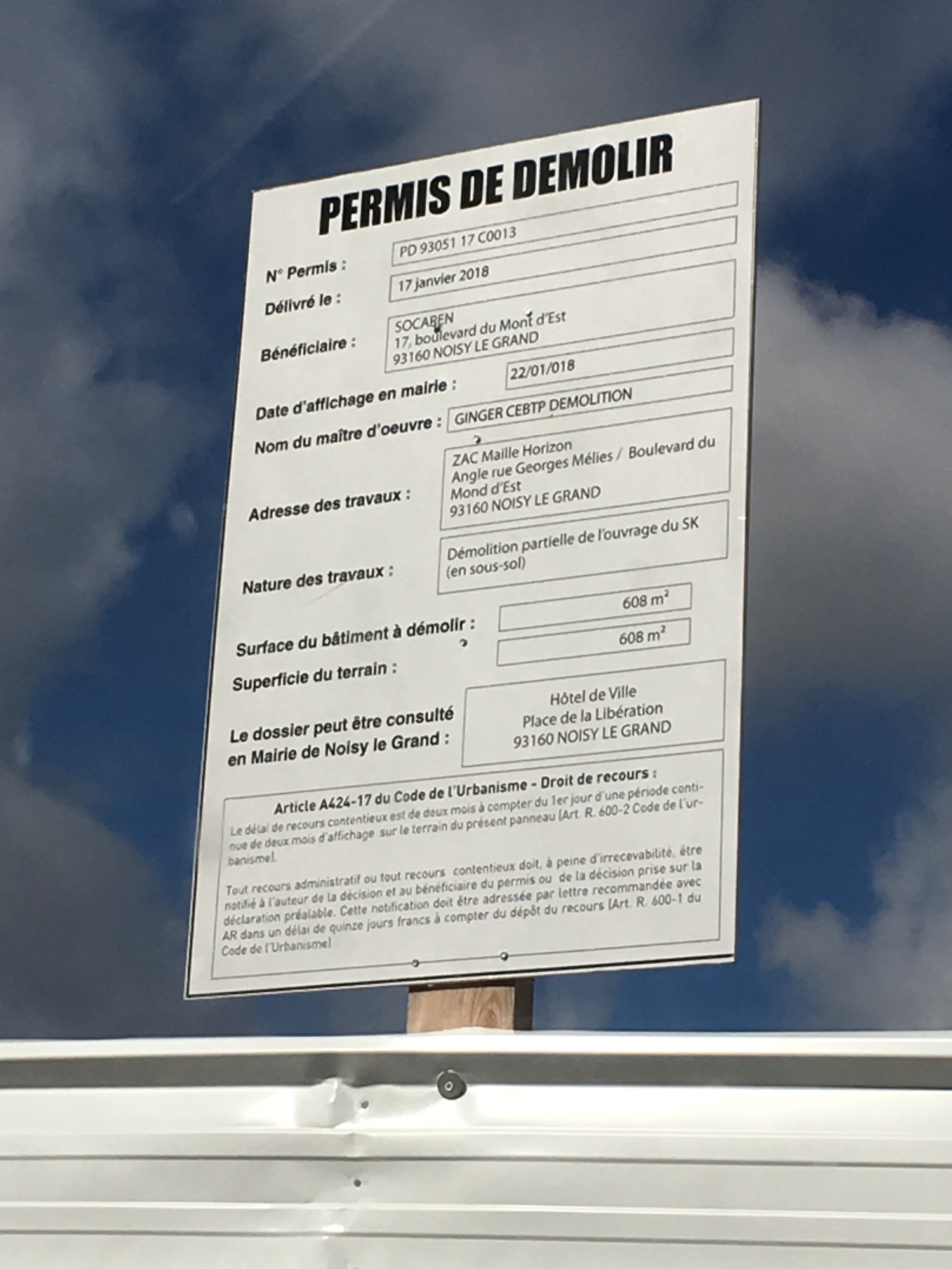 Permis de démolir une partie de l'ouvrage SK de Noisy-le-Grand, Seine-Saint-Denis, France.